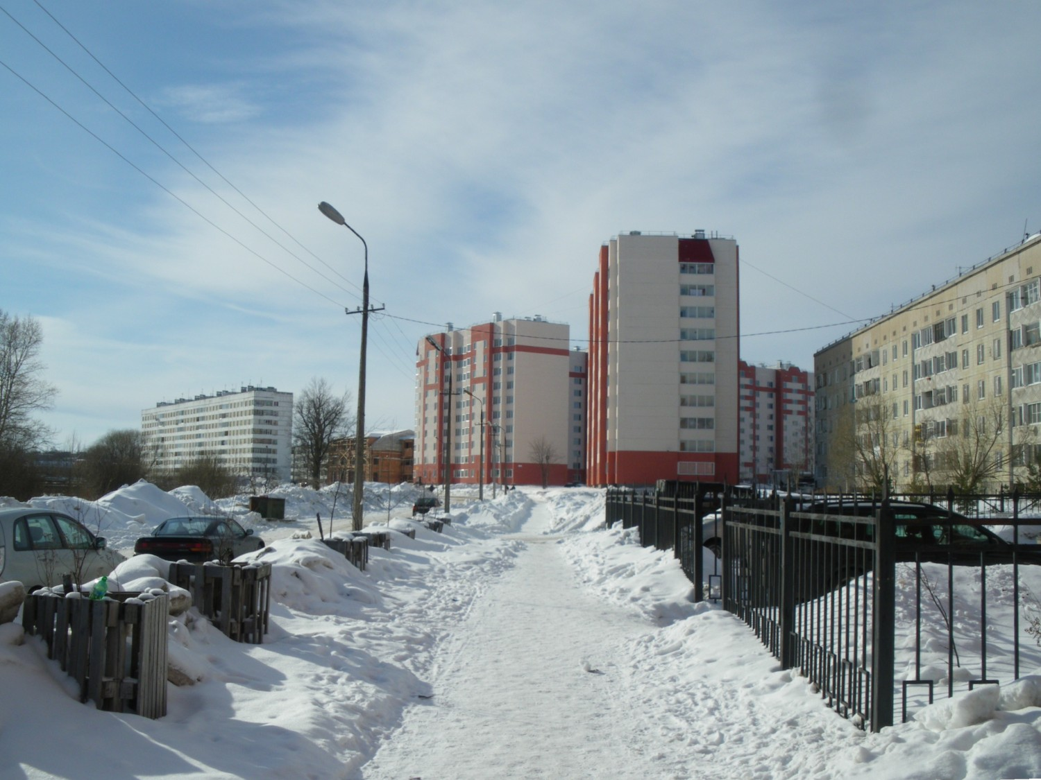 Россия, Ленинградская область, Гатчинский район, город Коммунар, Ижорская улица. Дата съёмки - 6 марта 2010 г. Автор - Роговиков Николай.